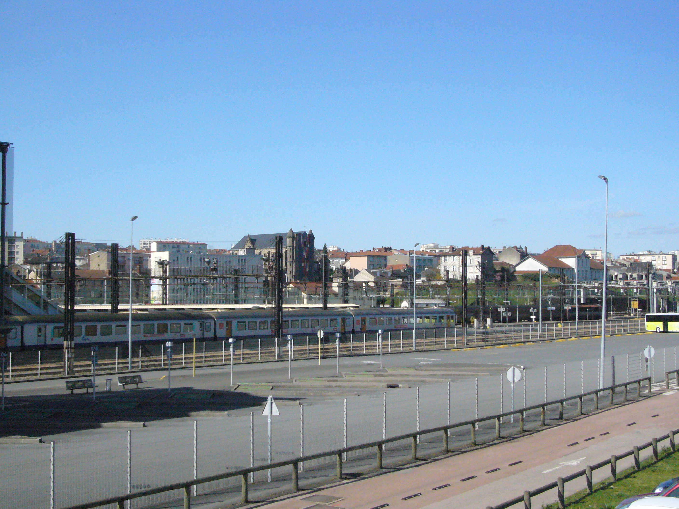 Le parking des véhicules de la gare routière du Centre intermodal d'échanges de Limoges (CIEL)